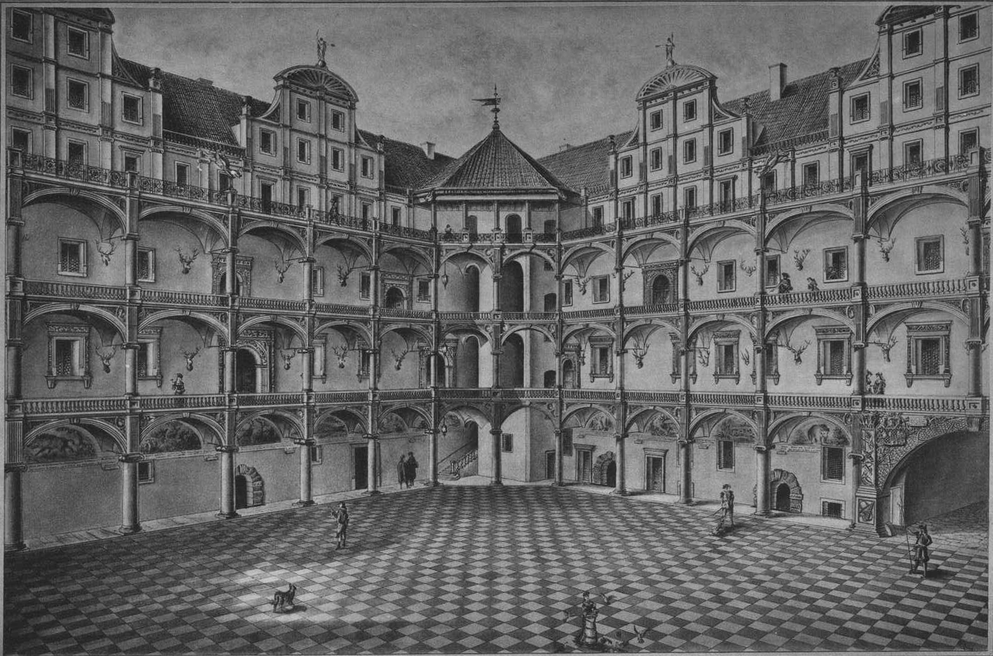 Zamek Piastów w Brzegu dziedziniec wewnętrzny.